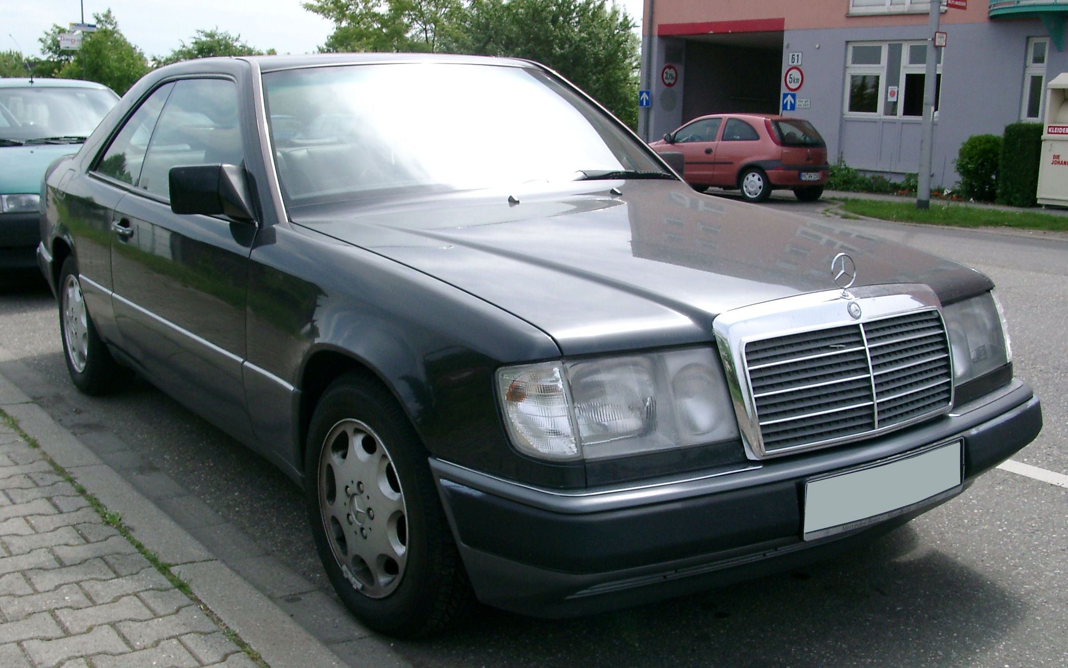 Mercedes-Benz C124, 300 CE